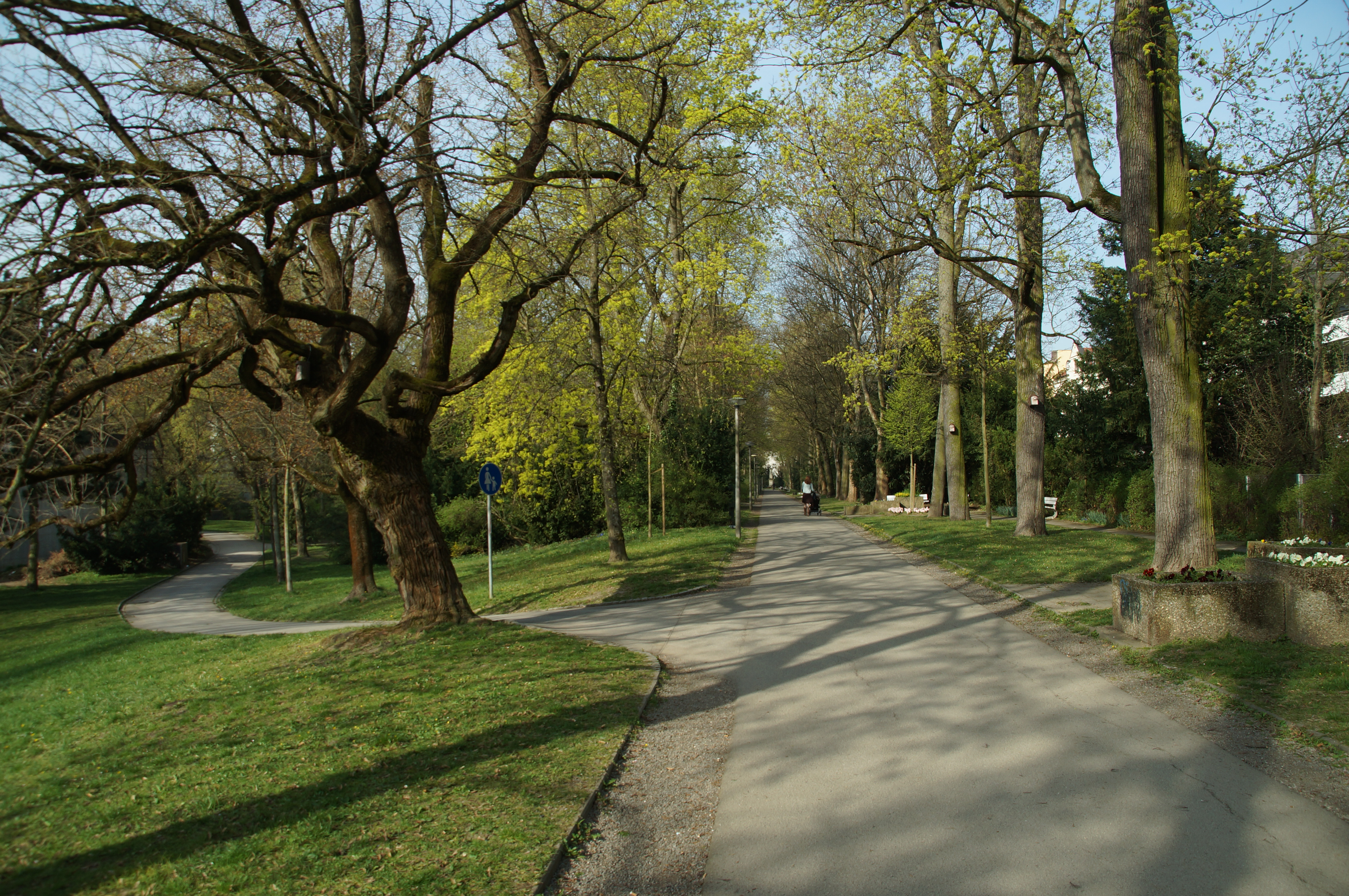 Ostenallee, Allee im Englischen Stil mit Denkmälern, 1779-81 von Fürst Carl Anselm von Thurn und Taxis anstelle der nachmittelalterlichen Bastionen als östlicher Teil des Grüngürtels um die Mauern der Altstadt angelegt; siehe Fürst-Anselm-Allee und Prebrunn-Allee